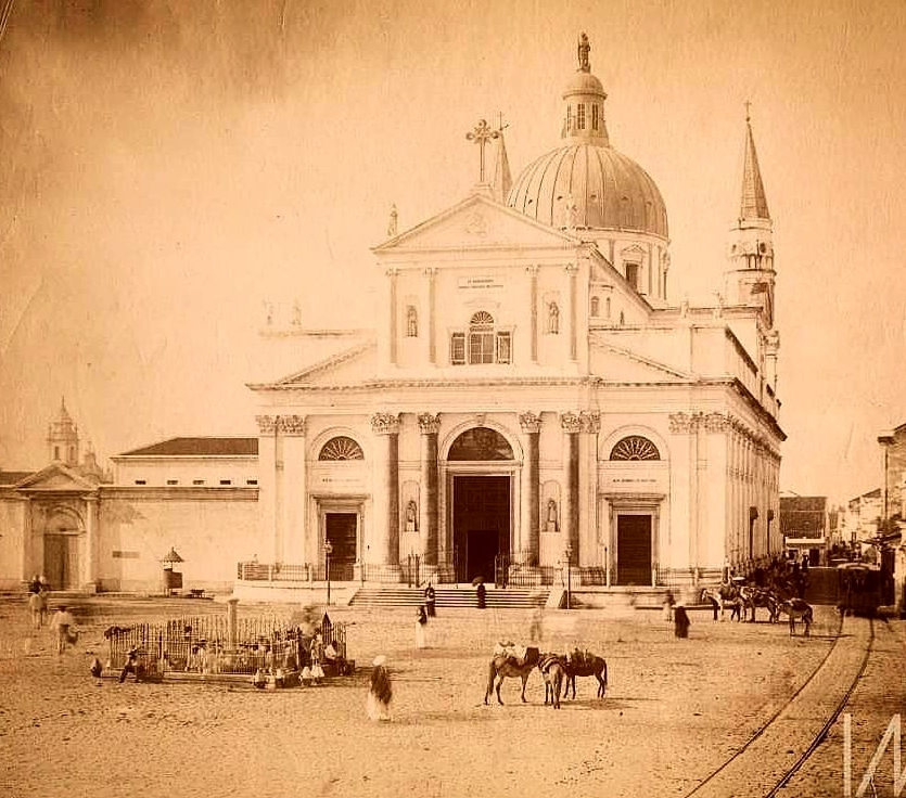 Basílica da Penha - Recife, Pernambuco, Brasil